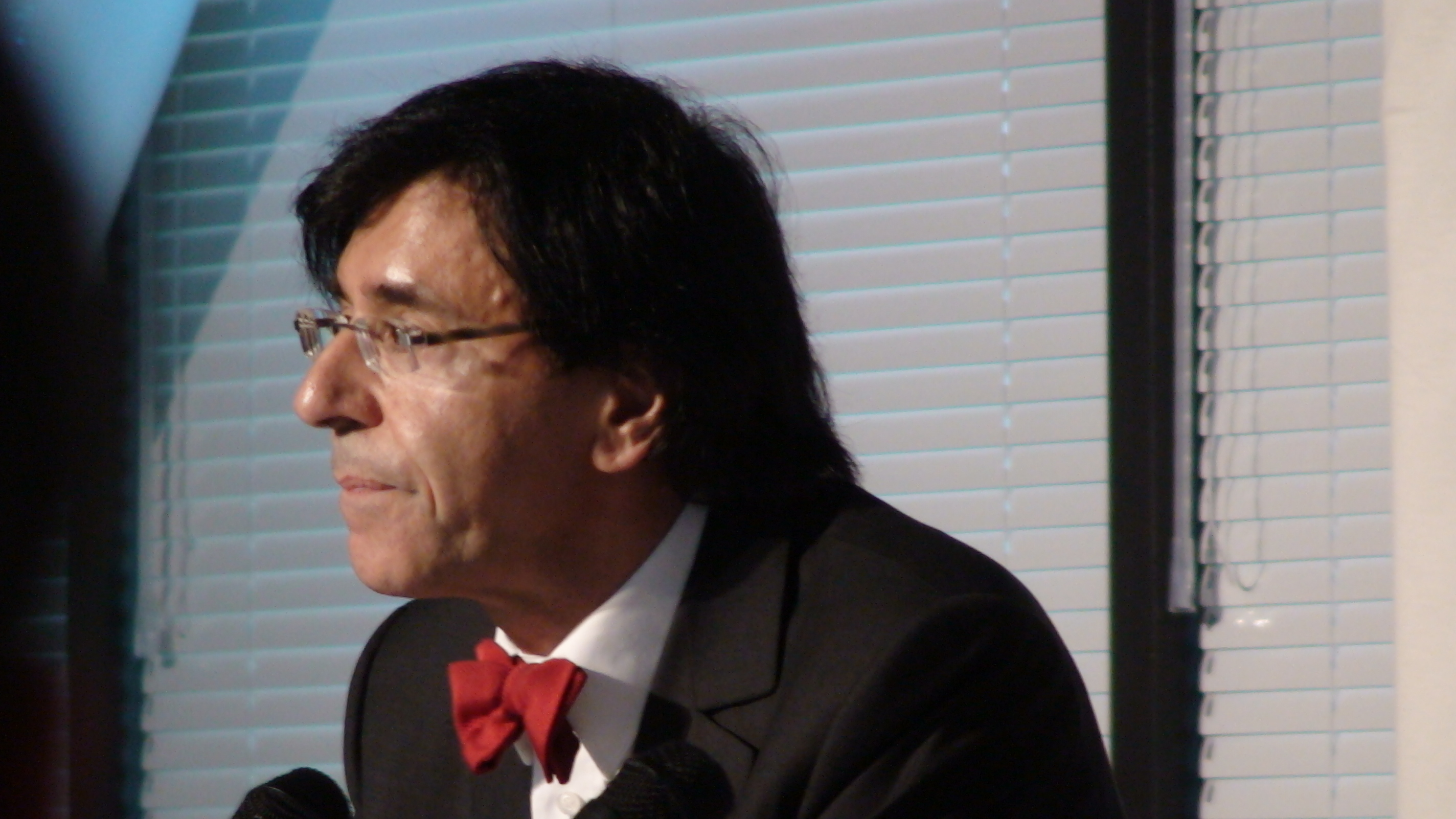 Elio Di Rupo in Louvain-la-Neuve